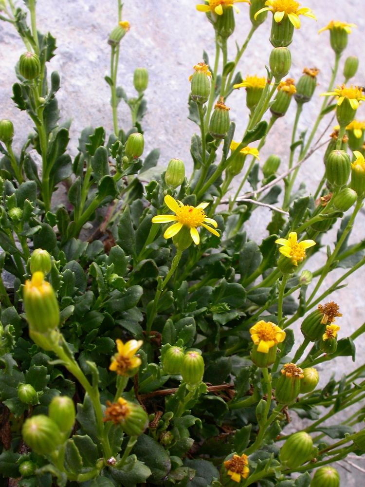 Senecio fremontii var. fremontii